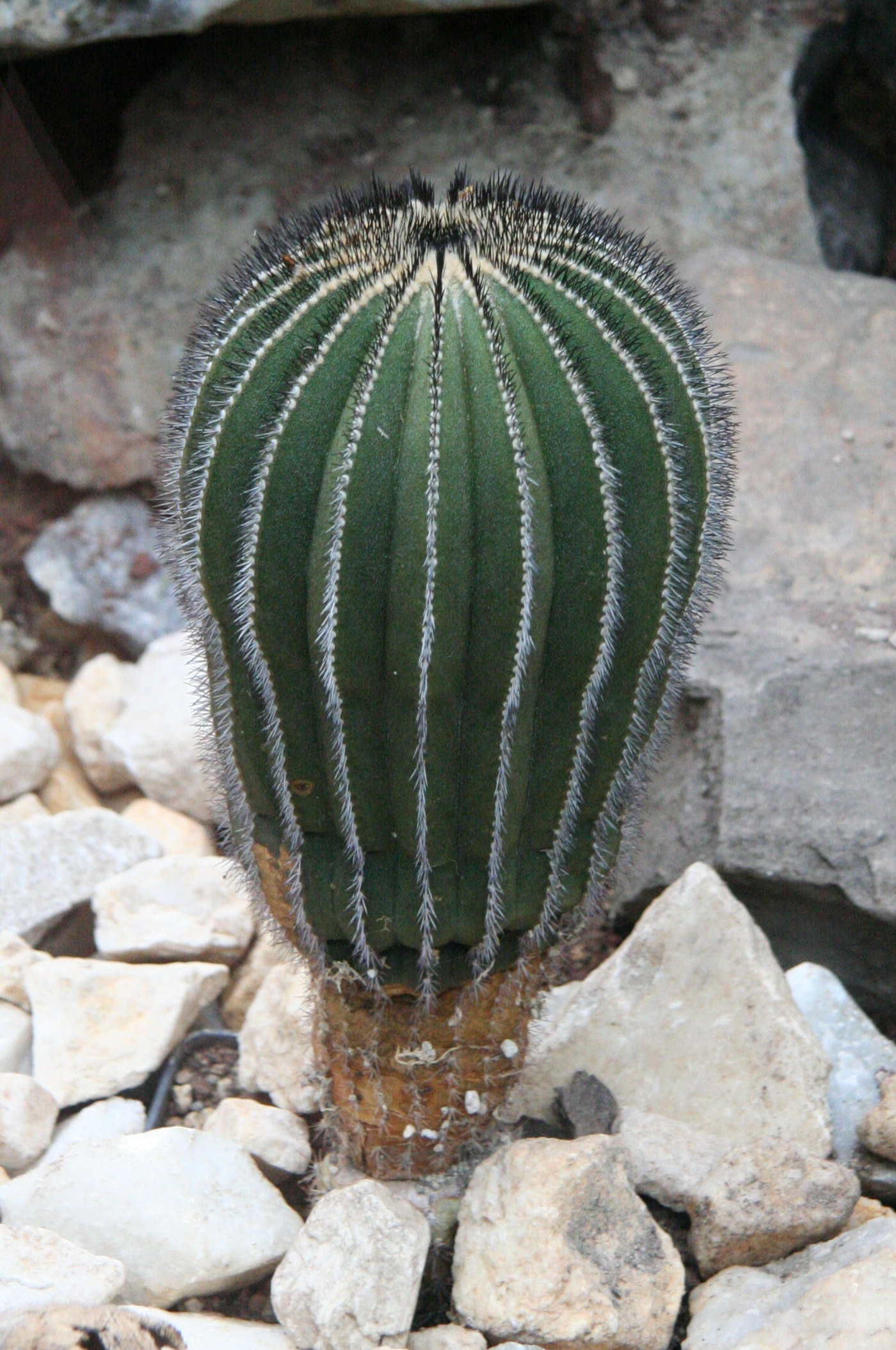 Uebelmannia pectinifera im Botanischen Garten Köln